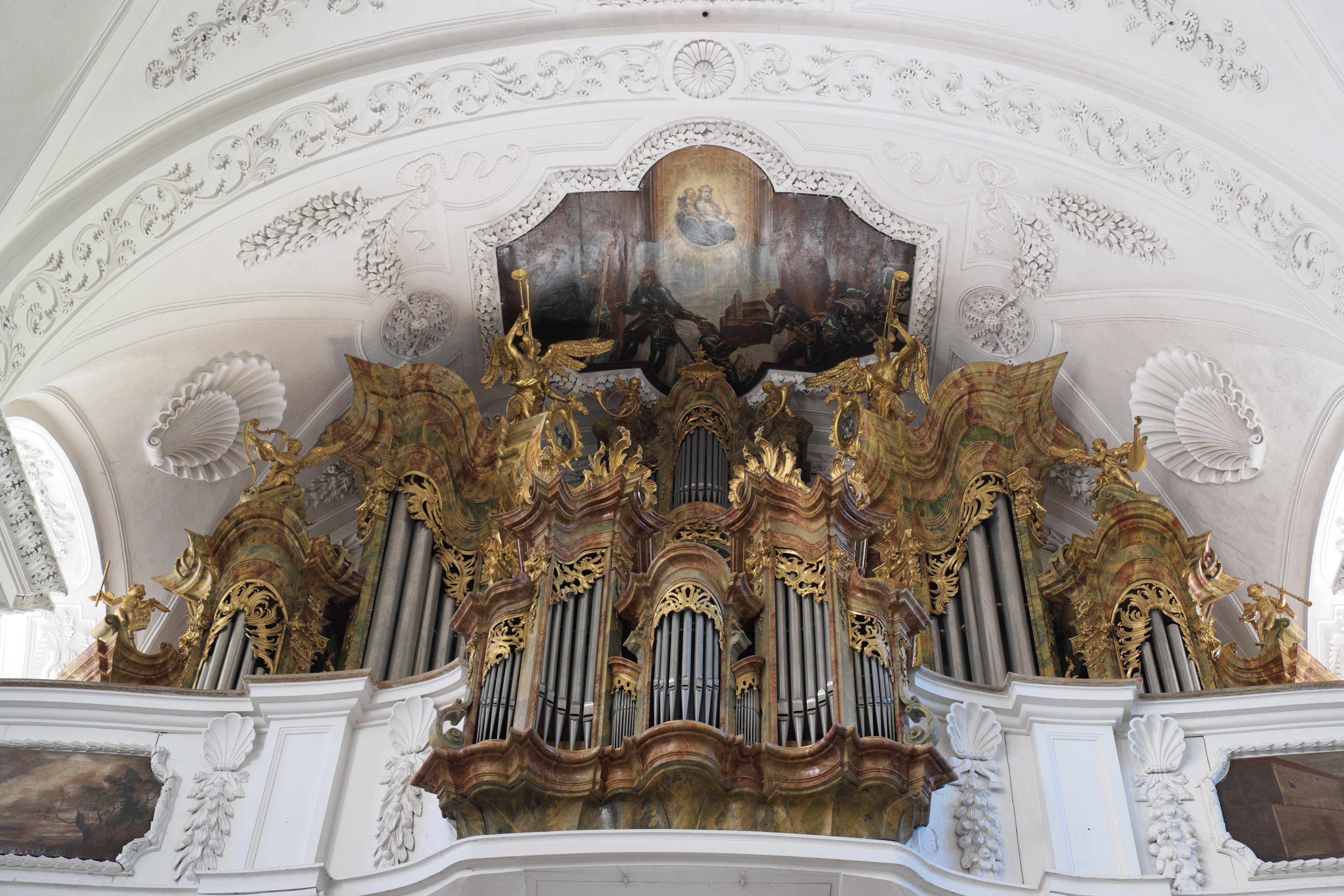 Ehemalige Benediktinerklosterkirche, heute katholische Pfarrkirche Mariä Himmelfahrt und Peter und Paul, in Irsee im Landkreis Ostallgäu in Schwaben (Bayern/Deutschland), Orgel von Balthasar Freiwiß, von 1752/54